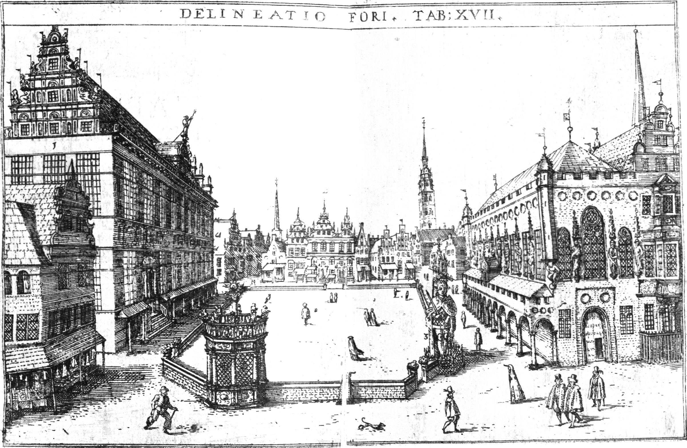 Bremen market place in 1603